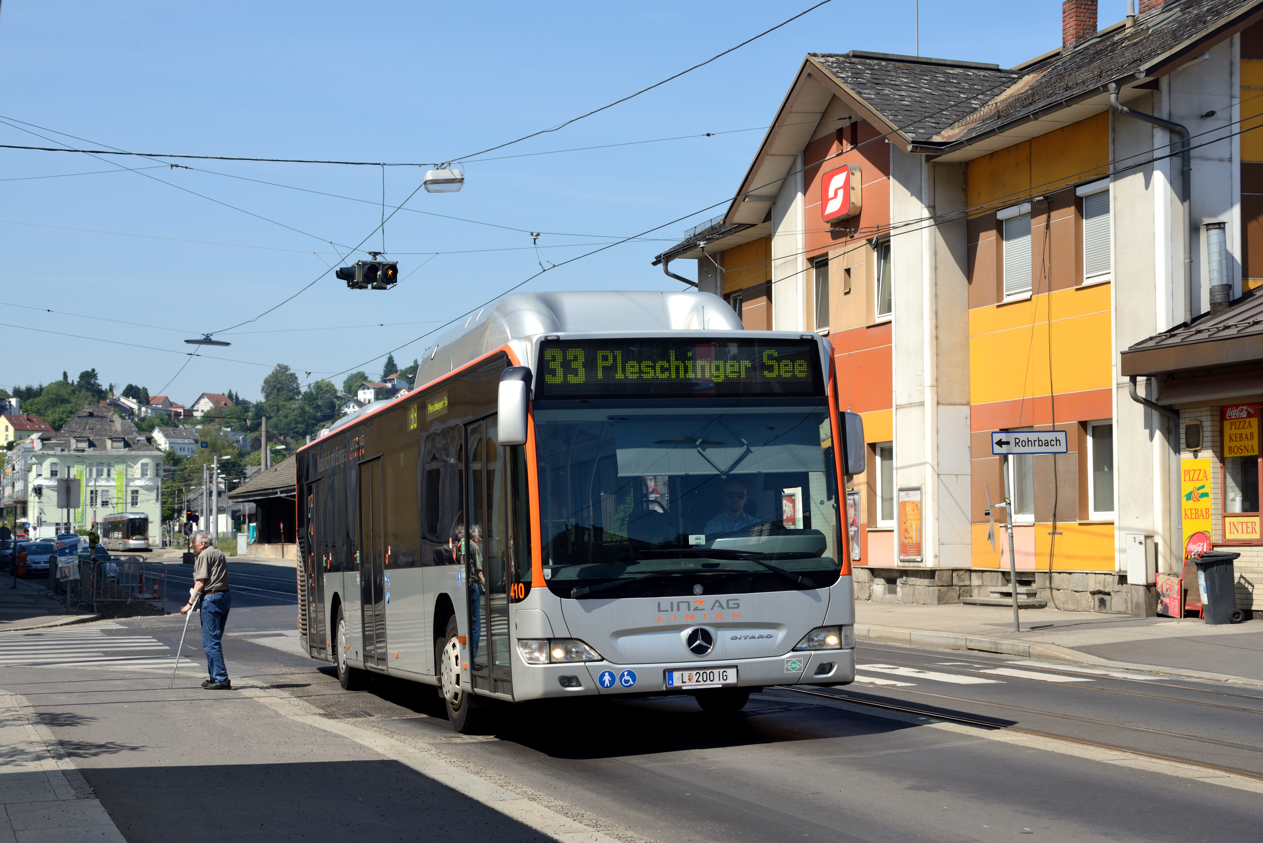 Mercedes Citaro Nr. 410 als Linie 33 beim Mühlkreisbahnhof